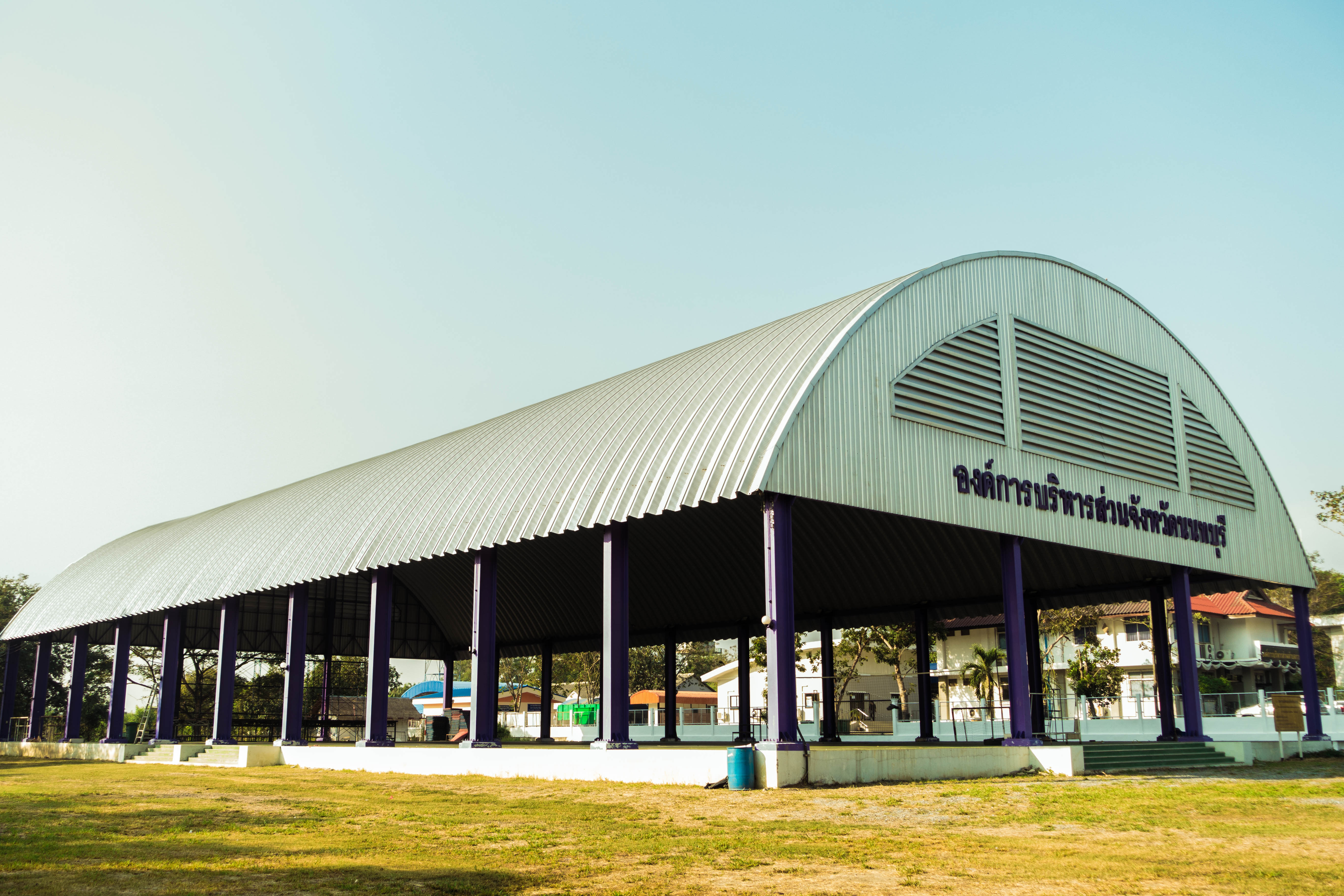 โดมของโรงเรียนราษฎร์นิยม